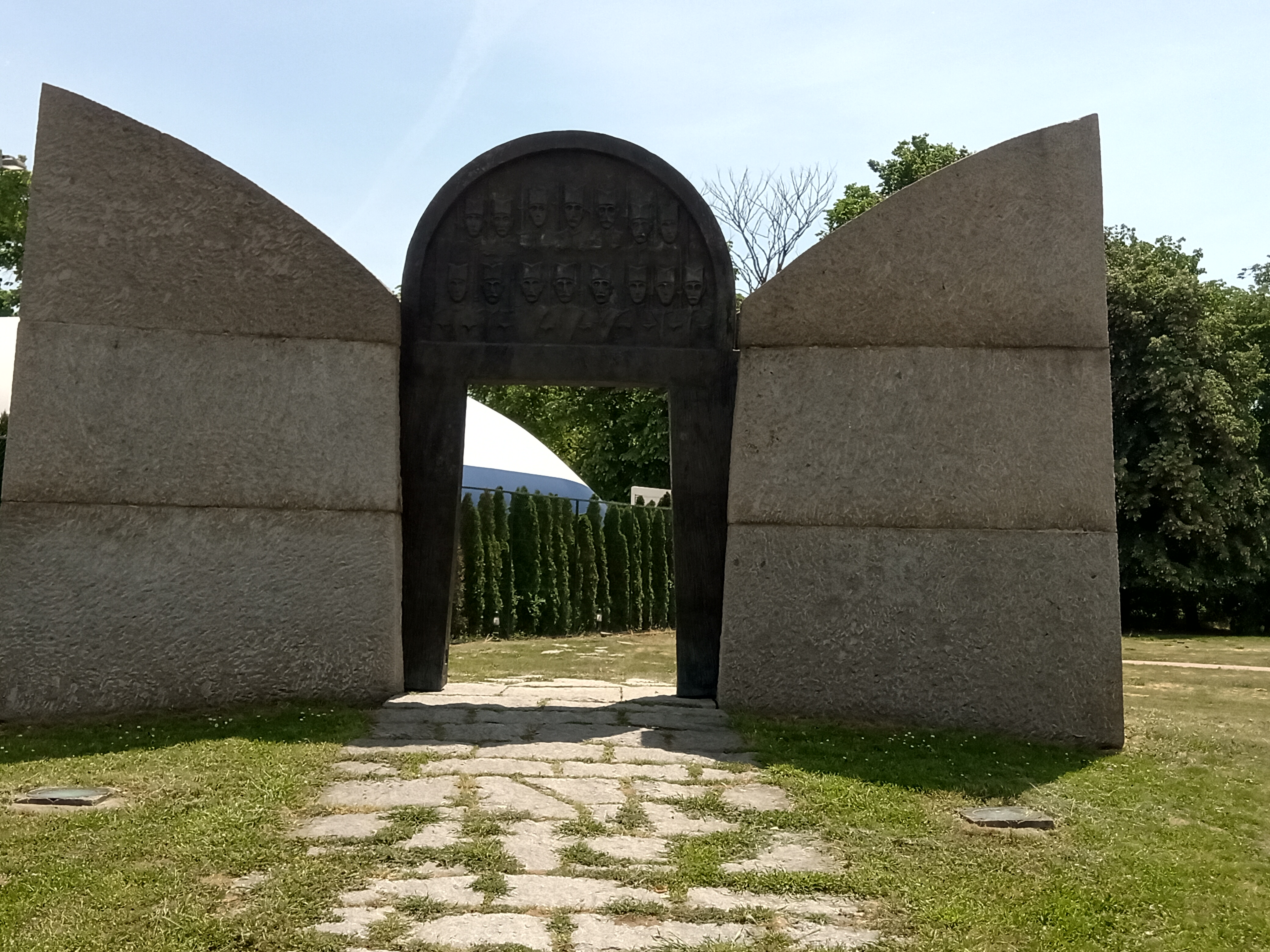 Споменик браниоцима Београда 1915.